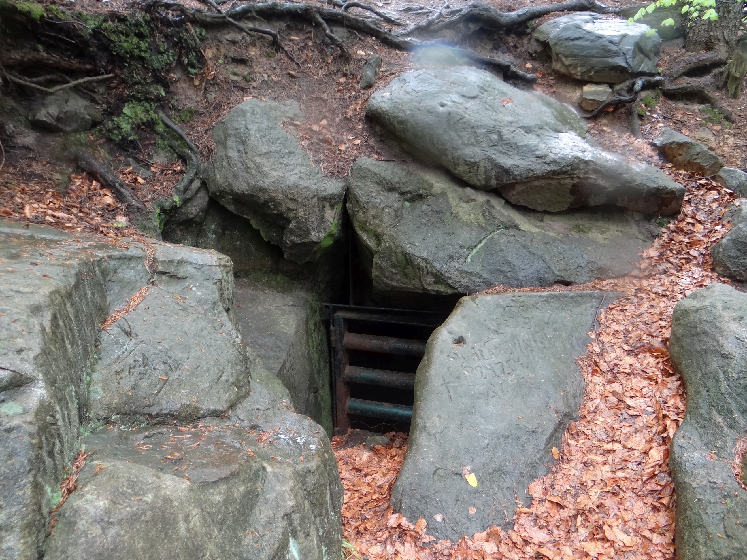 Diabla Dziura w Bukowcu